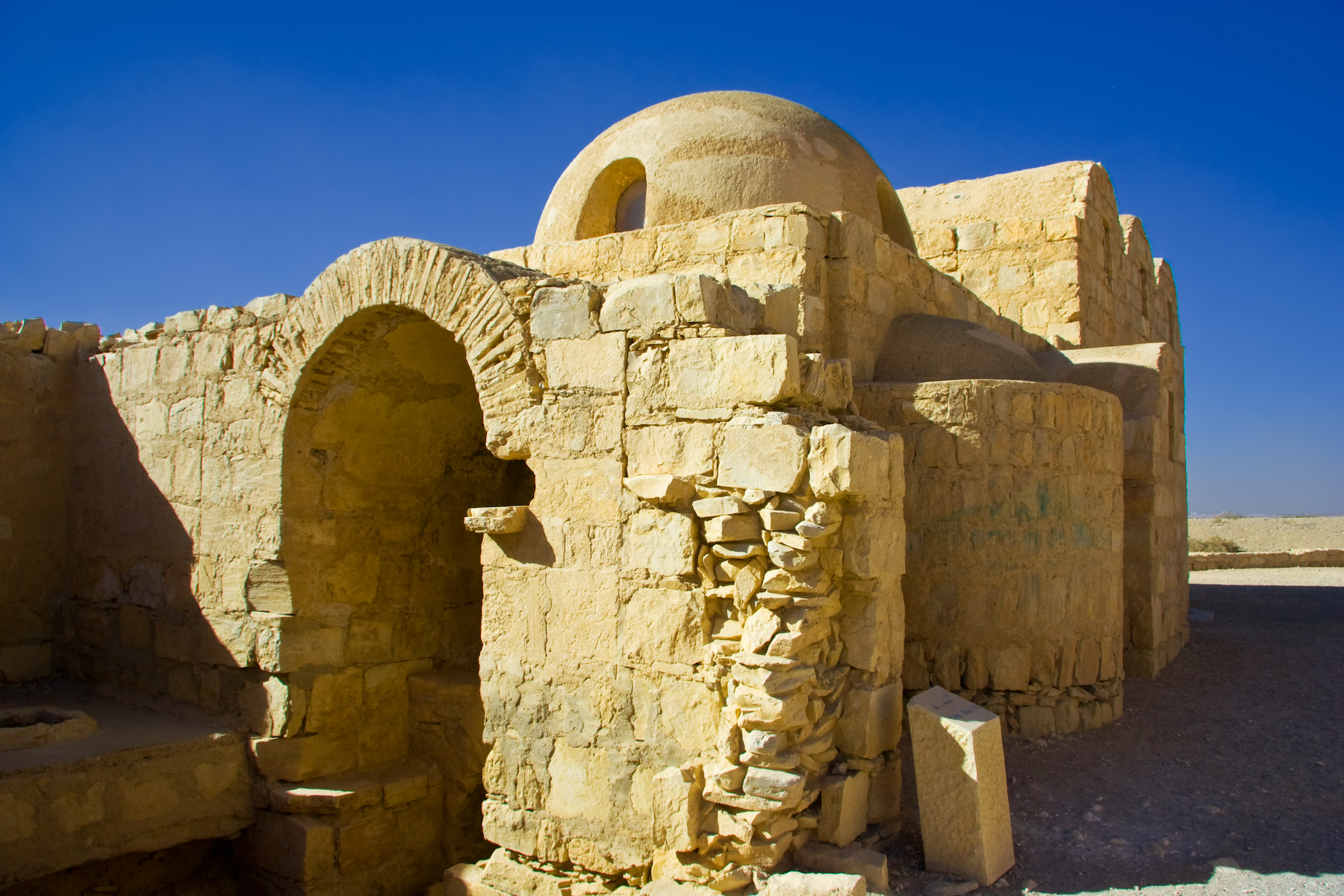 Qasr Amra in Jordan.